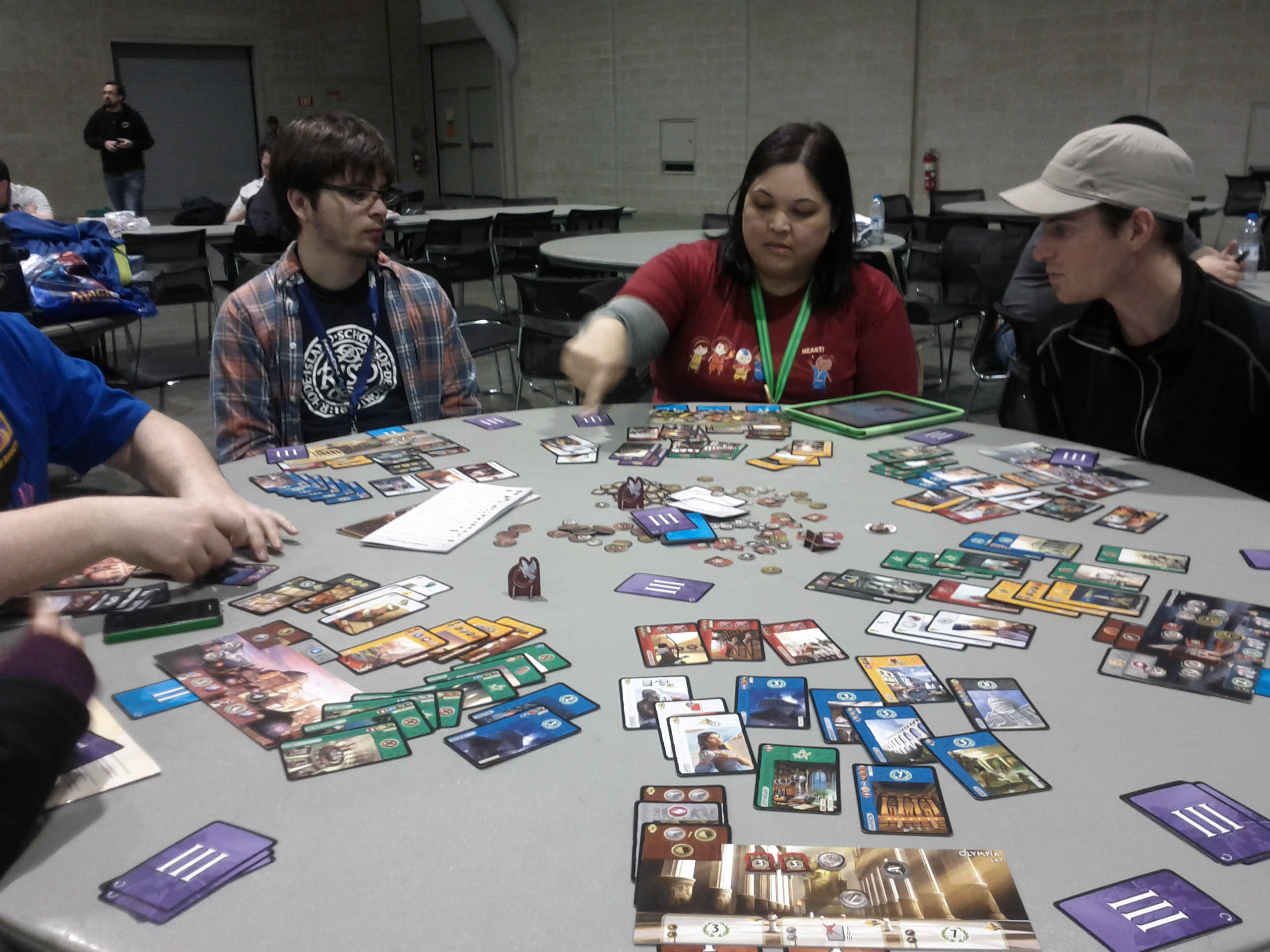 Une partie du jeu de société 7wonders